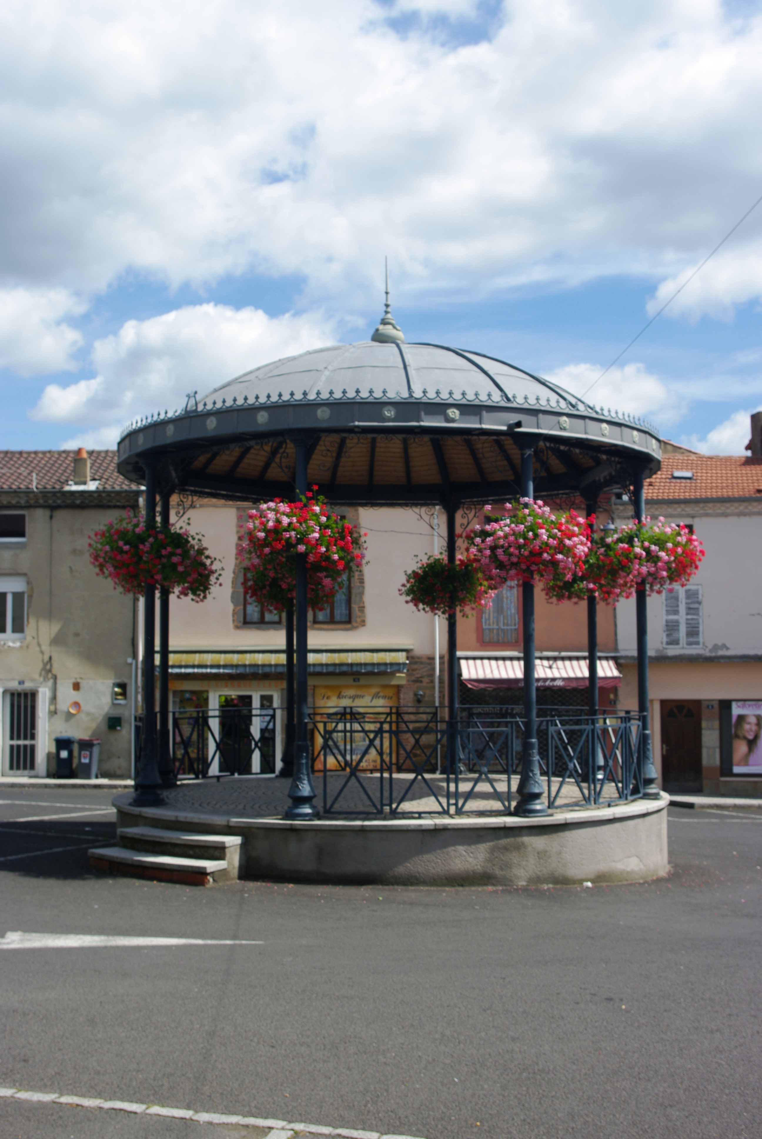 Photographie du kiosque Peynet de Brassac-les-Mines (63).